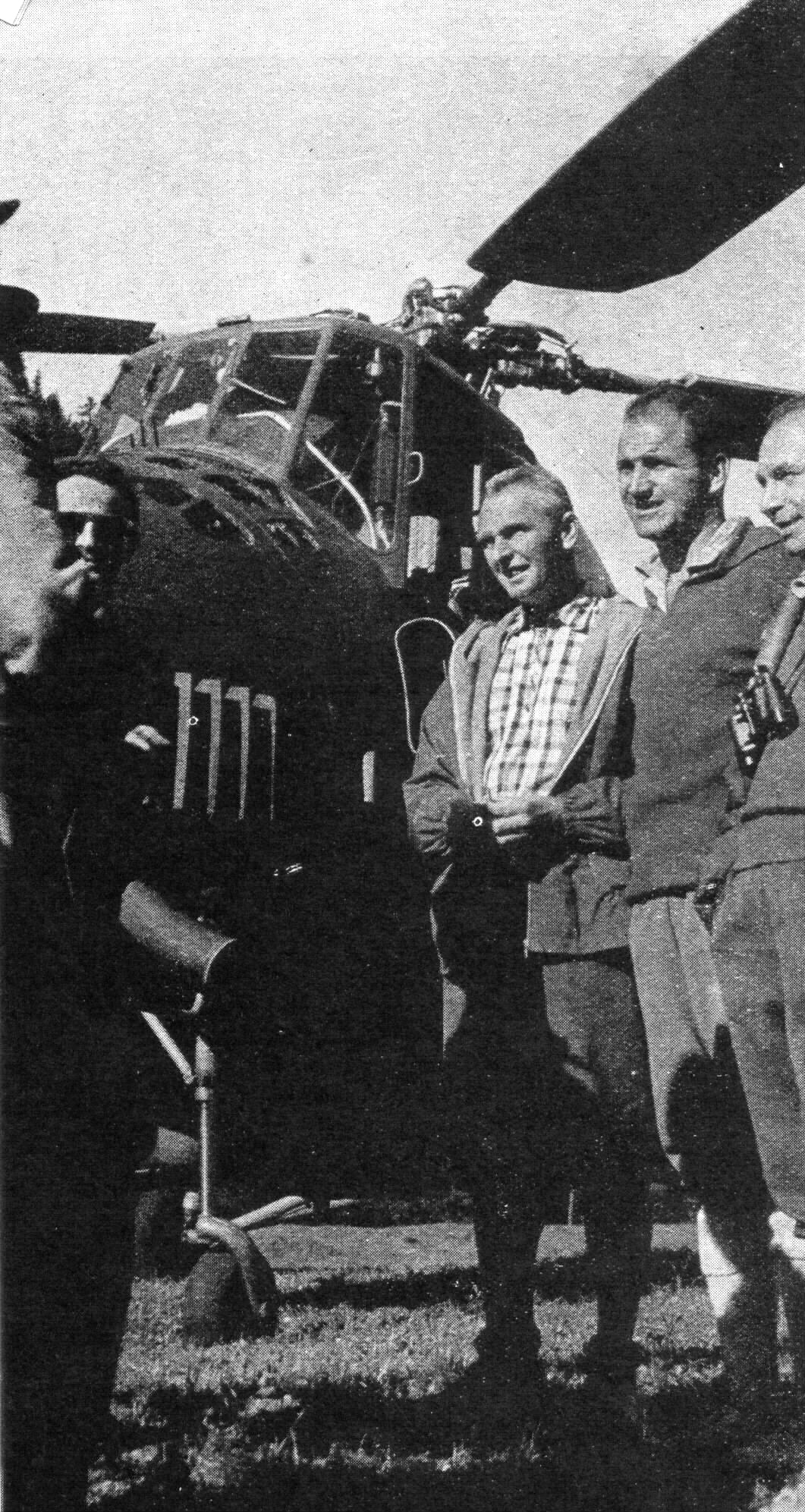 Prvá záchranná akcia s pomocou vrtuľníka vo Vysokých Tatrách v roku 1962 . Vrtuľník Mil Mi-4 na Poľane po Muráňom.